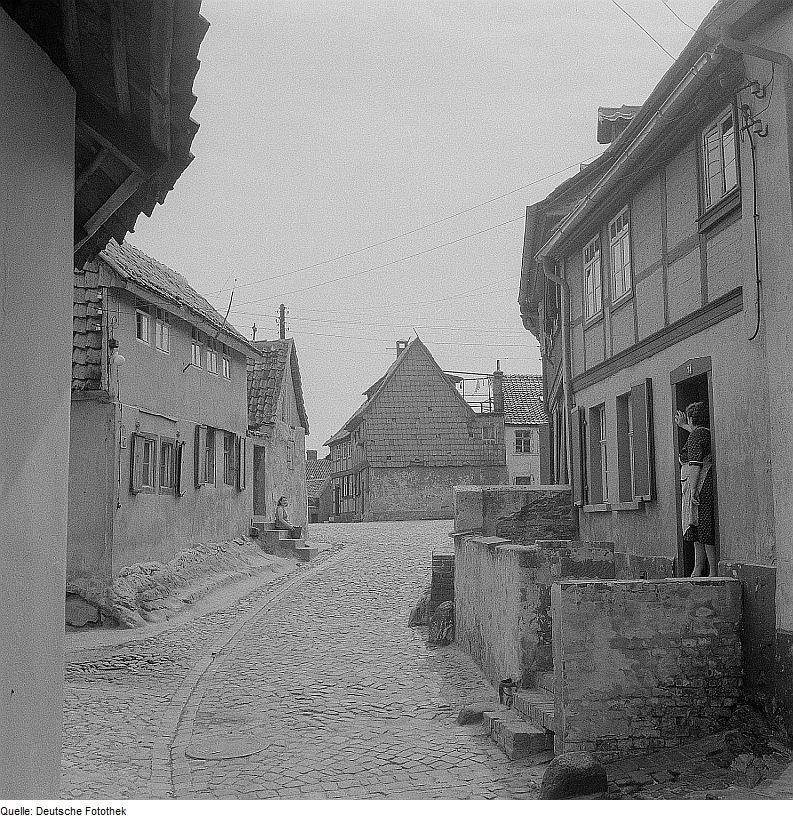 Original image description from the Deutsche Fotothek Quedlinburg. Blick durch eine Straße mit Fachwerkhäusern